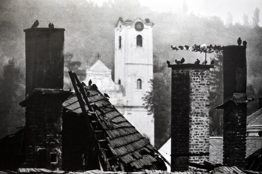 Pakrac 1991.